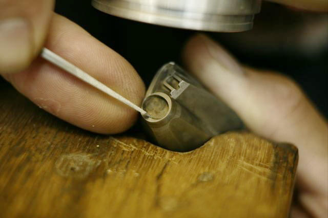 Description: "Gravure à l’échoppe. Atelier du livre d'art et de l'estampe. Imprimerie nationale". This is engraving a punch to make a "Qu" ligature.